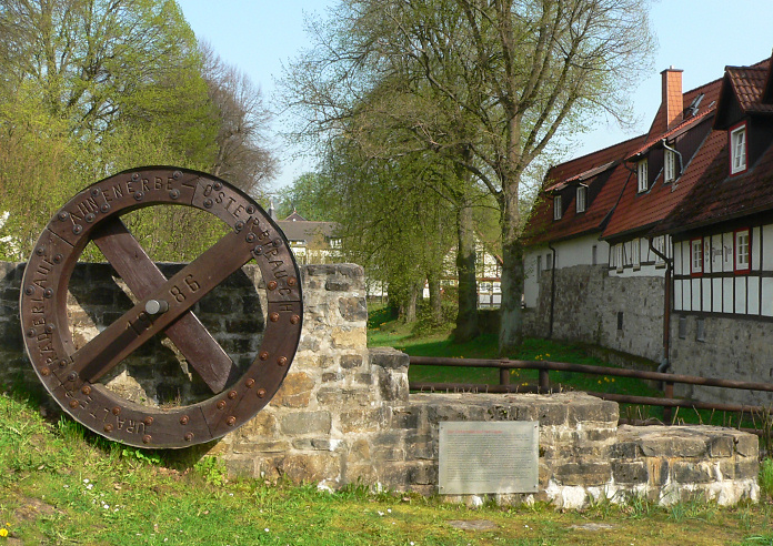 Osterrad Lüdge